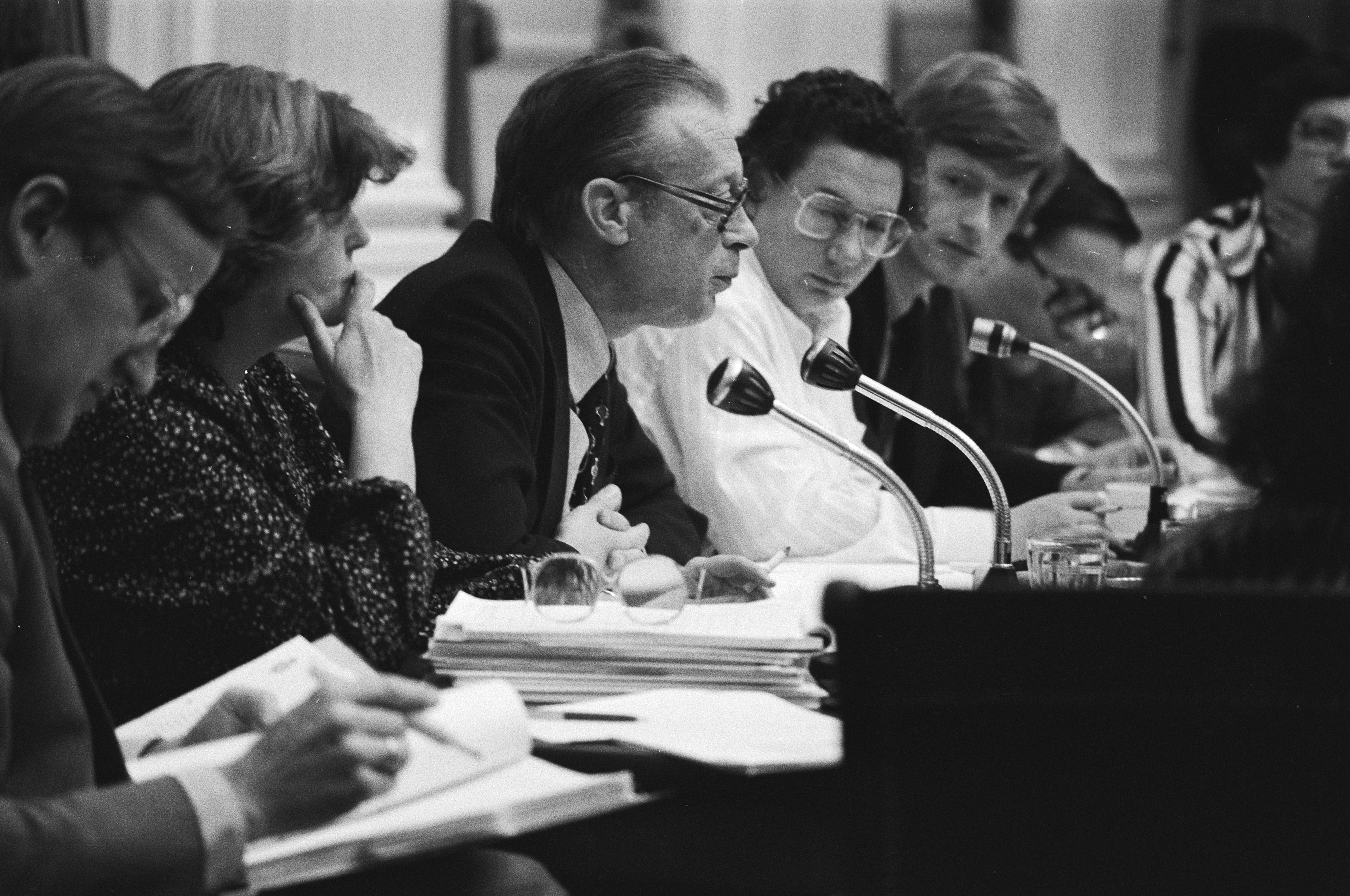 Collectie / Archief : Fotocollectie Anefo Reportage / Serie : Tweede Kamer hoorzitting abortus Beschrijving : Leden van de bijzondere commissie voor de wetsvoorstellen inzake zwangerschapsafbreking (abortus provocatus); mevrouw Wutrich, de heer Roethof en voorzitter mevrouw Haas-Berger Datum : 18 mei 1979 Trefwoorden : abortussen, parlementariërs, politiek, voorzitters Persoonsnaam : Haas-Berger, Ineke, Roethof, Hein, Wuthrich-van der Vlist, Marijke Fotograaf : Croes, Rob C. / Anefo Auteursrechthebbende : Nationaal Archief Materiaalsoort : Negatief (zwart/wit) Nummer archiefinventaris : bekijk toegang 2.24.01.05 Bestanddeelnummer : 930-2732